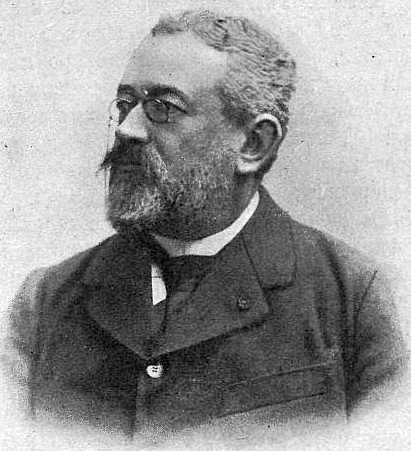 Алексей Сергеевич Ермолов